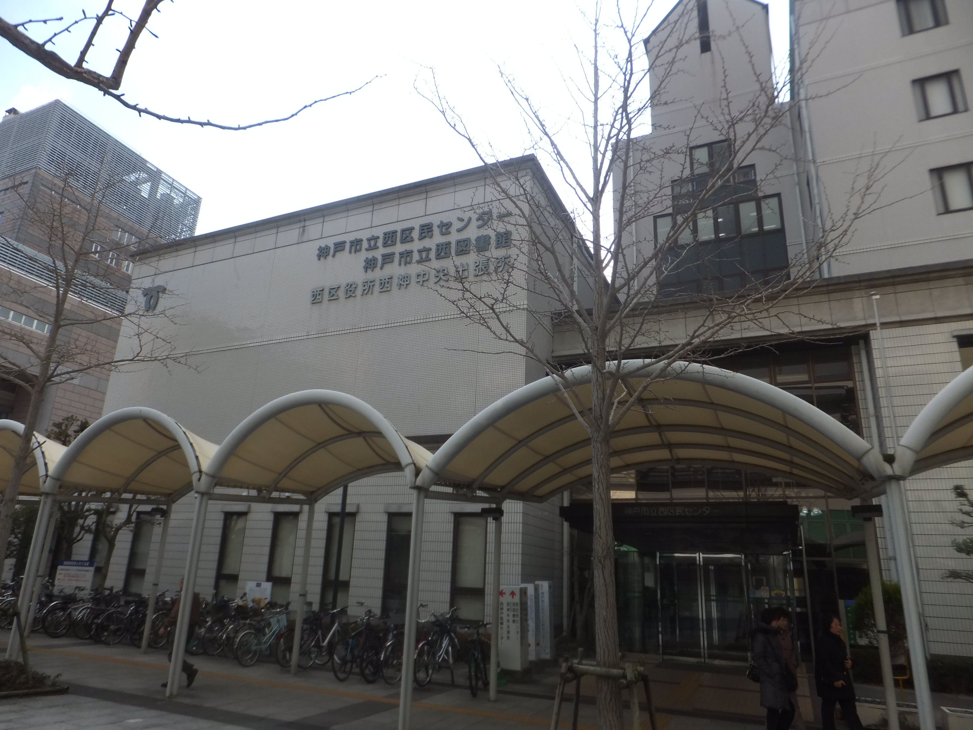 神戸市立西区民センター、神戸市立西図書館、神戸市西区役所西神中央出張所